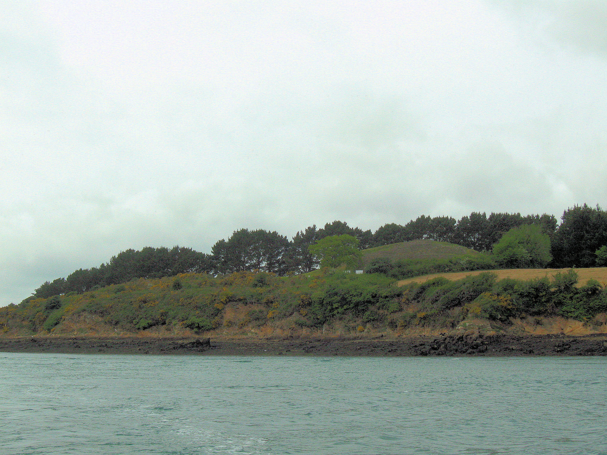 Cairn auf der Insel Gavrinis, bei Larmor-Baden, Golf von Morbihan